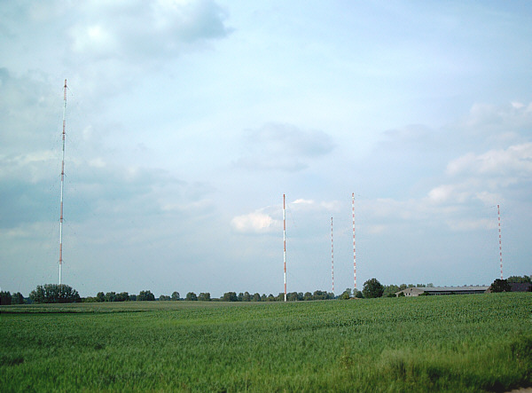 Die 5 Sendetürme von Zehlendorf bei Oranienburg, Deutschland.